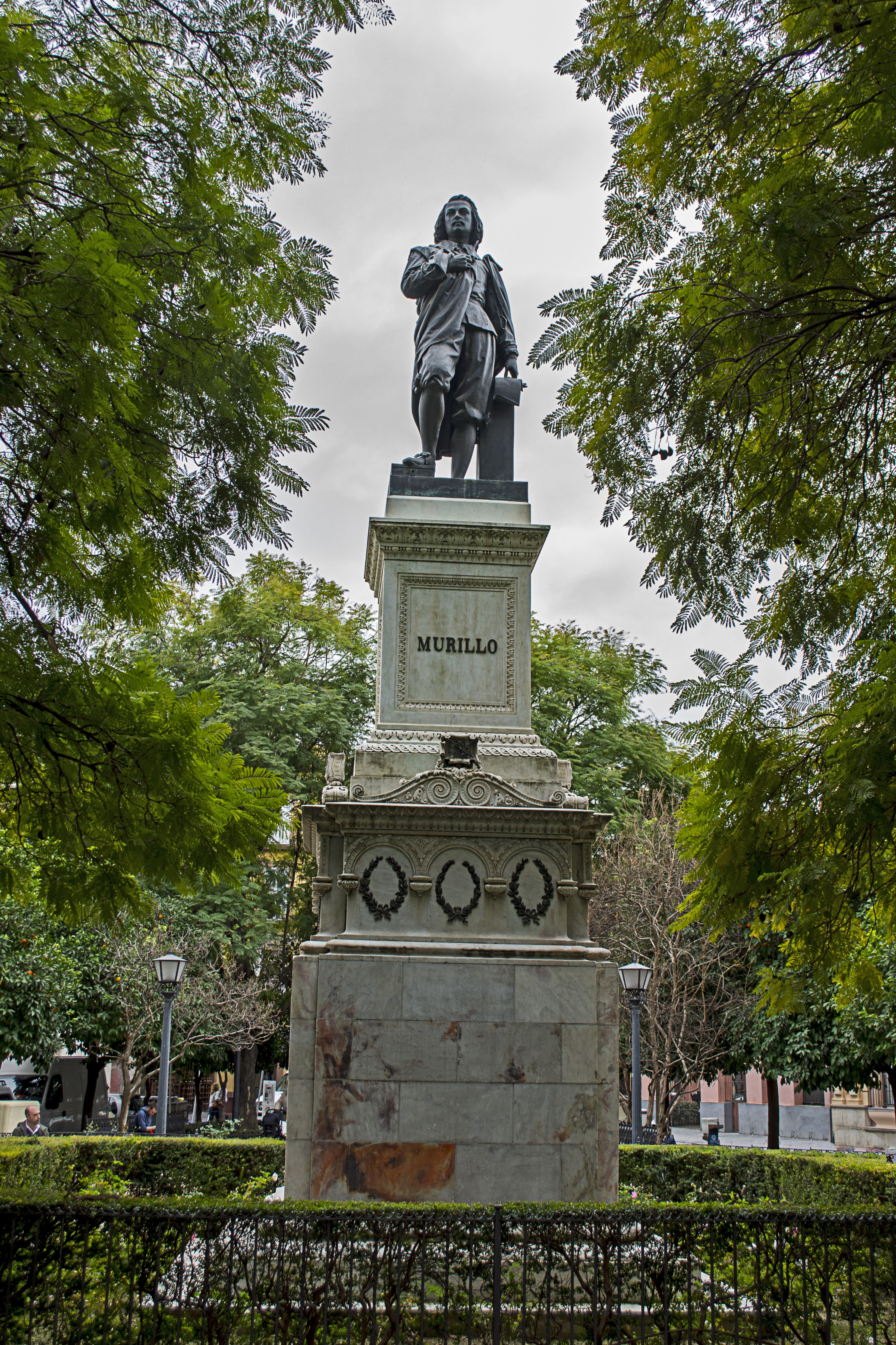 Monumento al pintor Bartolomé Esteban Murillo en la plaza del Museo de Sevilla.